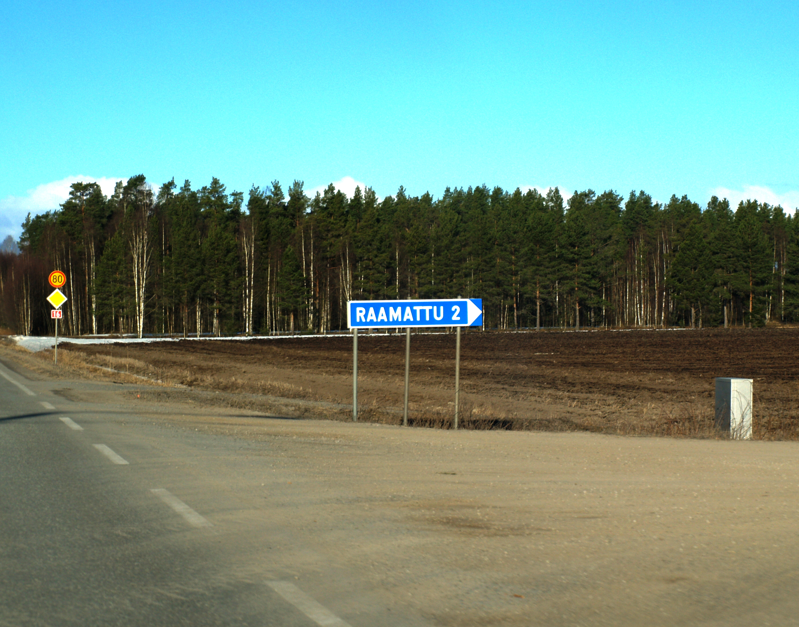 Raamatun kylän kyltti Lapualla.